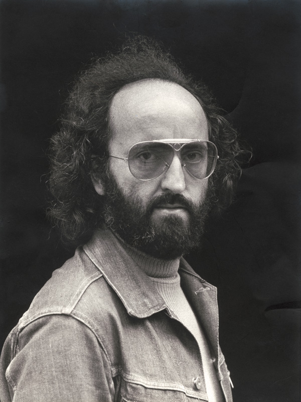 Franco Summa (1938–2020)